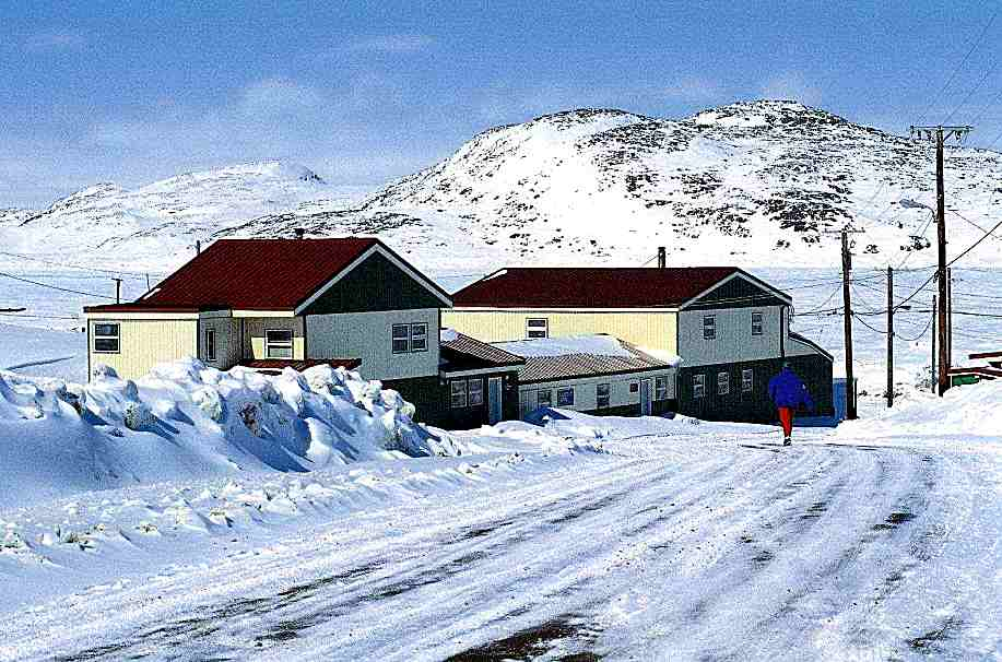 Kinngait Printshop, Cape Dorset, Nunavut, Canada